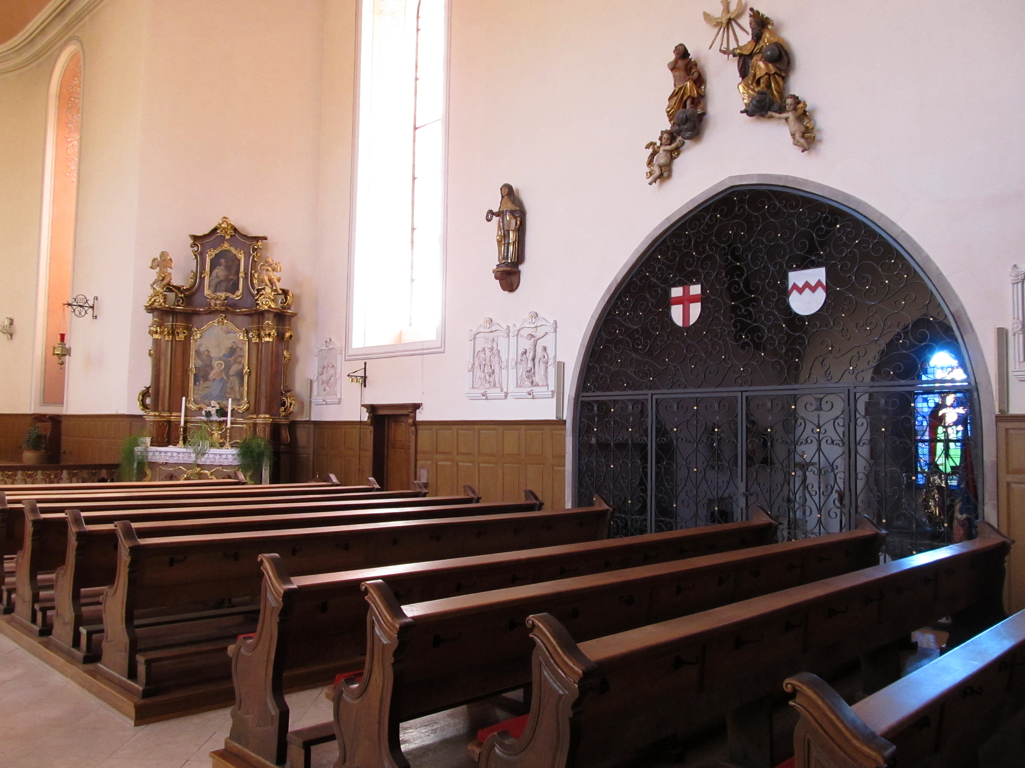 Blick ins Innere der katholischen Pfarrkirche St. Stephan in Illingen, Saarland